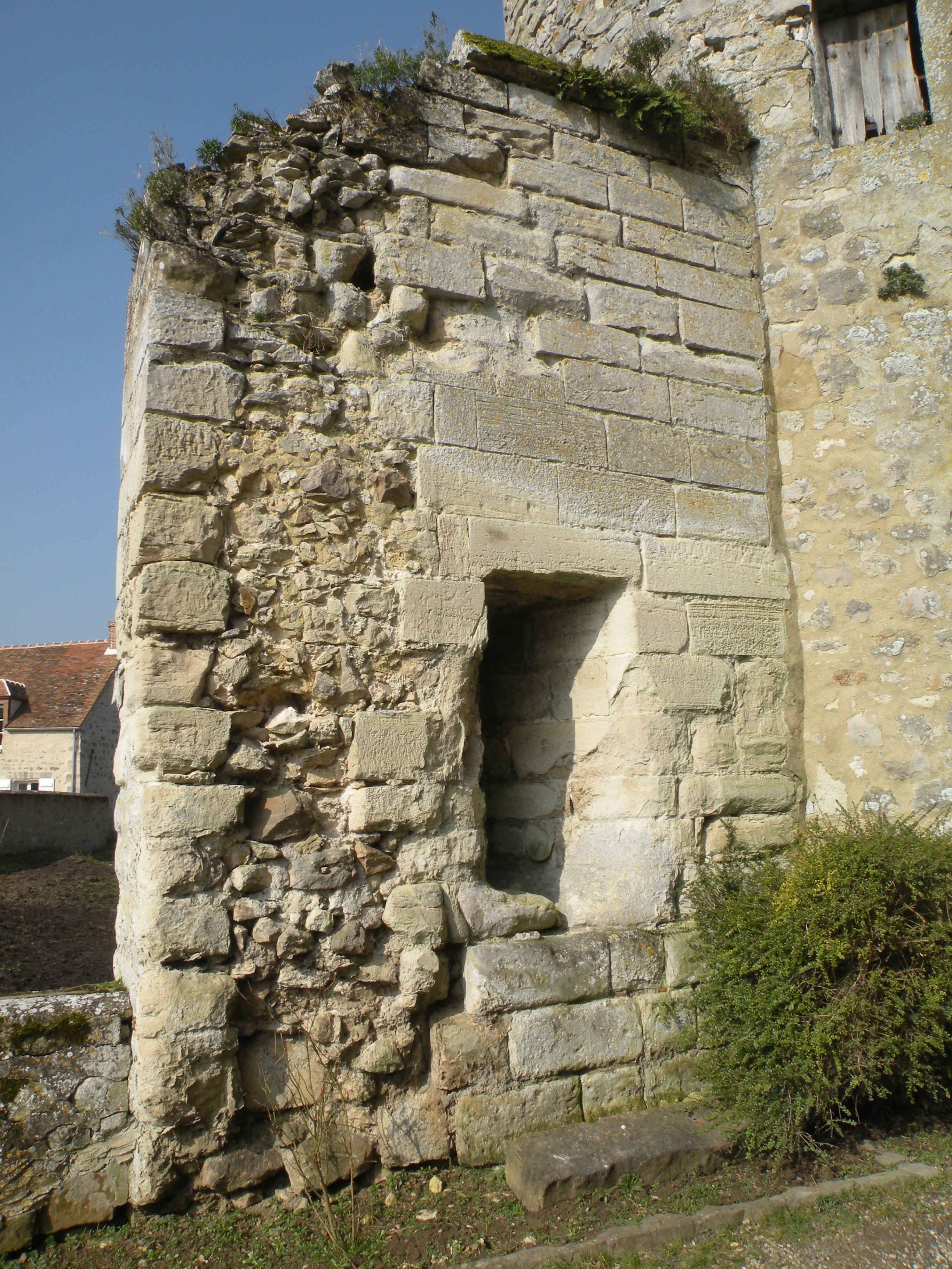 Château de Montépilloy